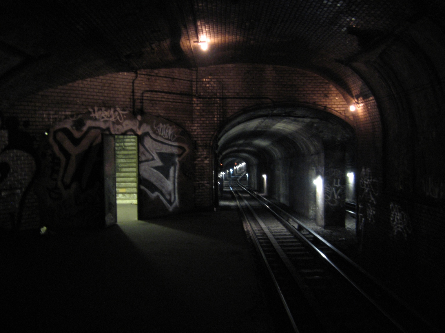 Journées du patrimoine RATP 16-17/09/2006. Station fantôme de Saint-Martin.